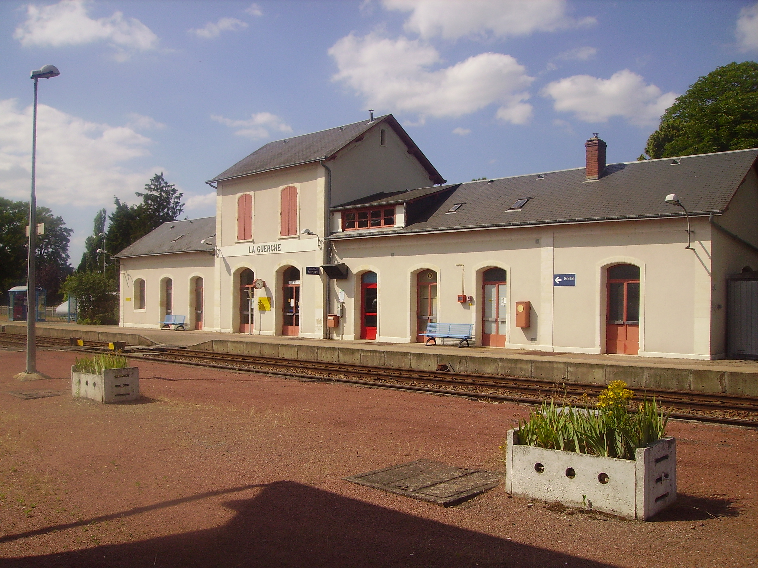 Gare de La Guerche (Cher)